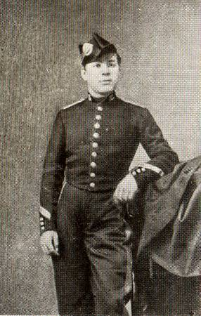 Le polytechnicien Joseph Joffre à l'âge de 17 ans, vers 1869. Photographie reproduite dans The Illustrated London News, 23 janvier 1915.